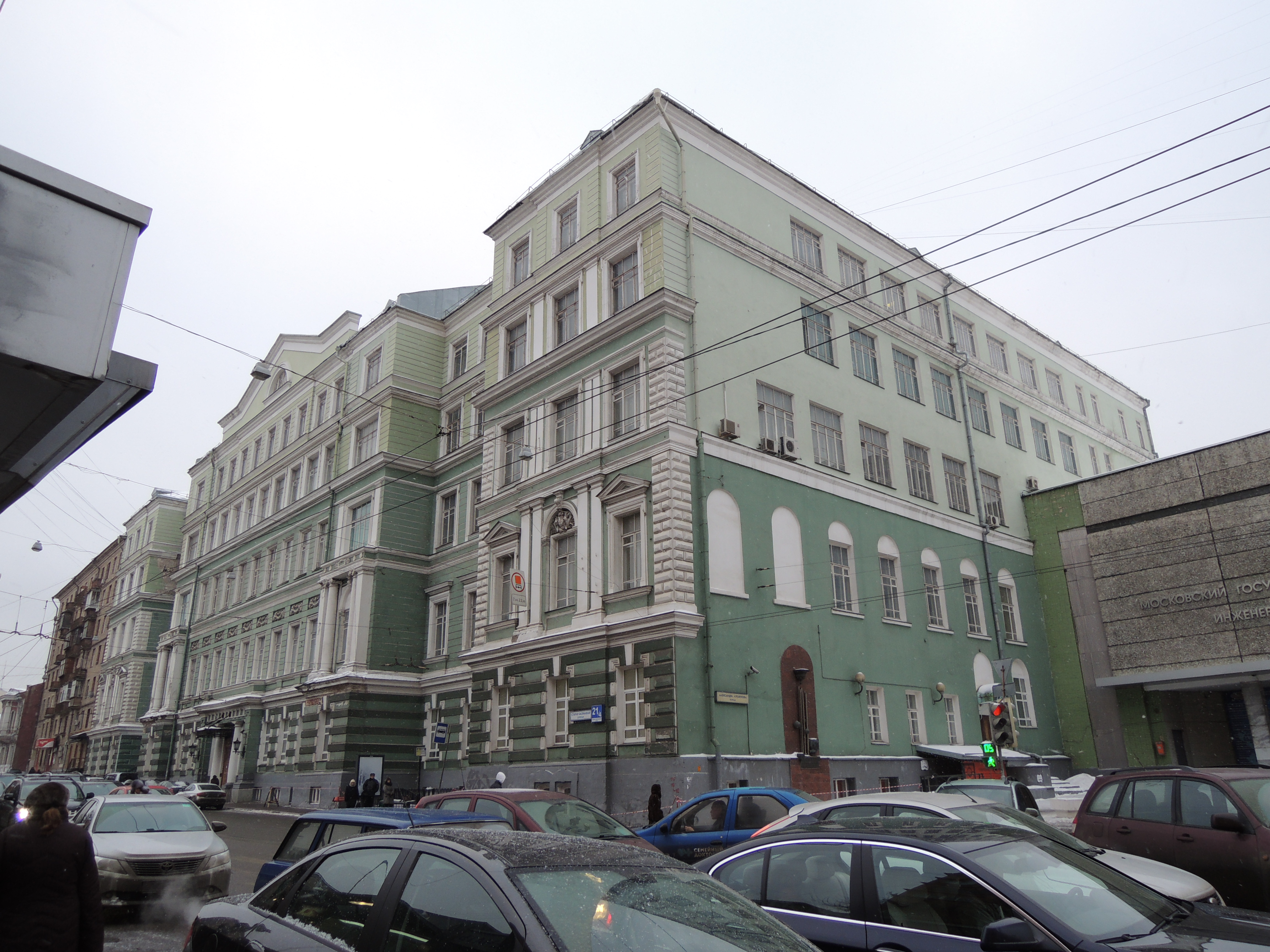 № 21/4, стр. 1 — Городская усадьба П. И. Демидова — А. Б. Куракина, арх. Р. Р. Казаков (1790-е); в 1836 году перестроена под размещение Константиновского межевого института архитектором Е. Д. Тюриным; в 1886 году перестроена в Александровское коммерческое училище Б. В. Фрейденбергом. Объект культурного наследия регионального значения